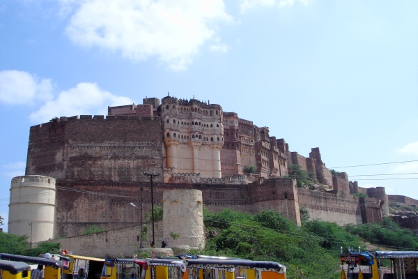 Mehrangarh Fort in India